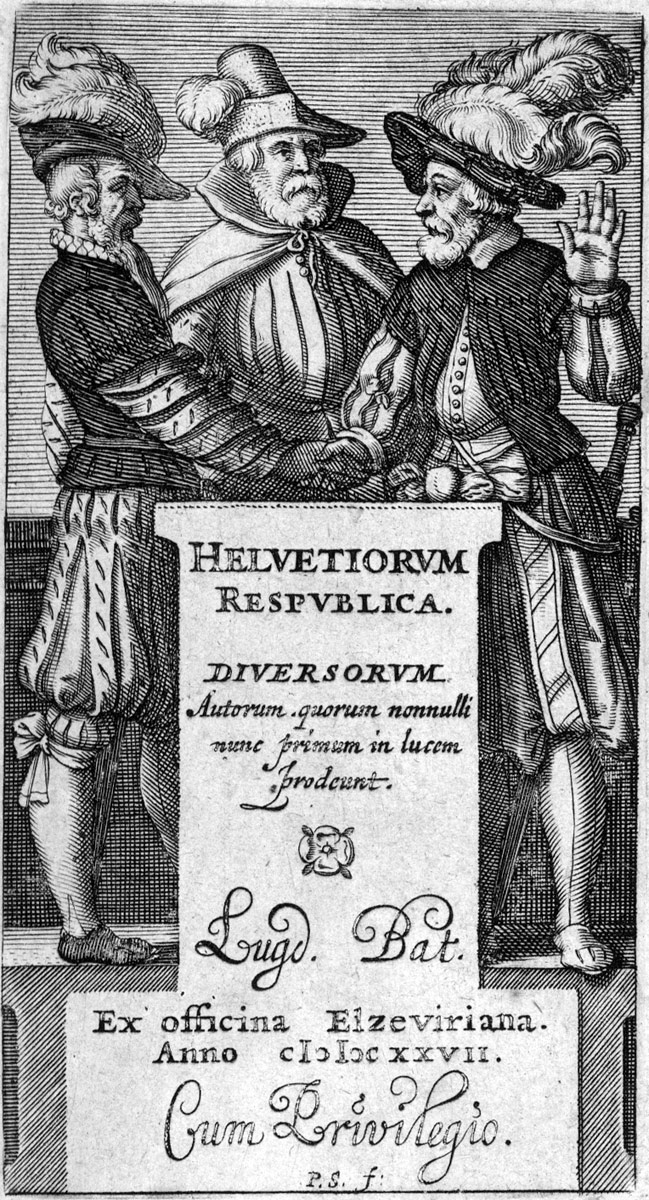 Titelblatt mit Darstellung des Rütlischwur, aus: Josias Simler: Helvetiorum respublica. Diversorum Autorum quorum nonnulli nunc primum in lucem prodeunt, Leiden, Elzevier 1627